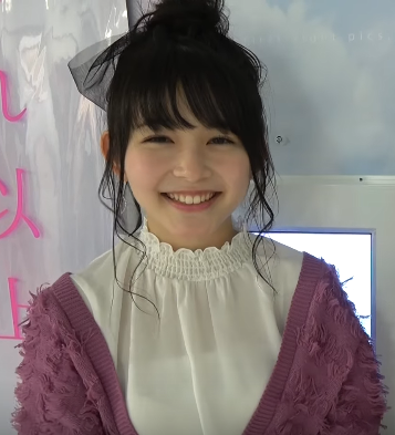 久間田琳加です。